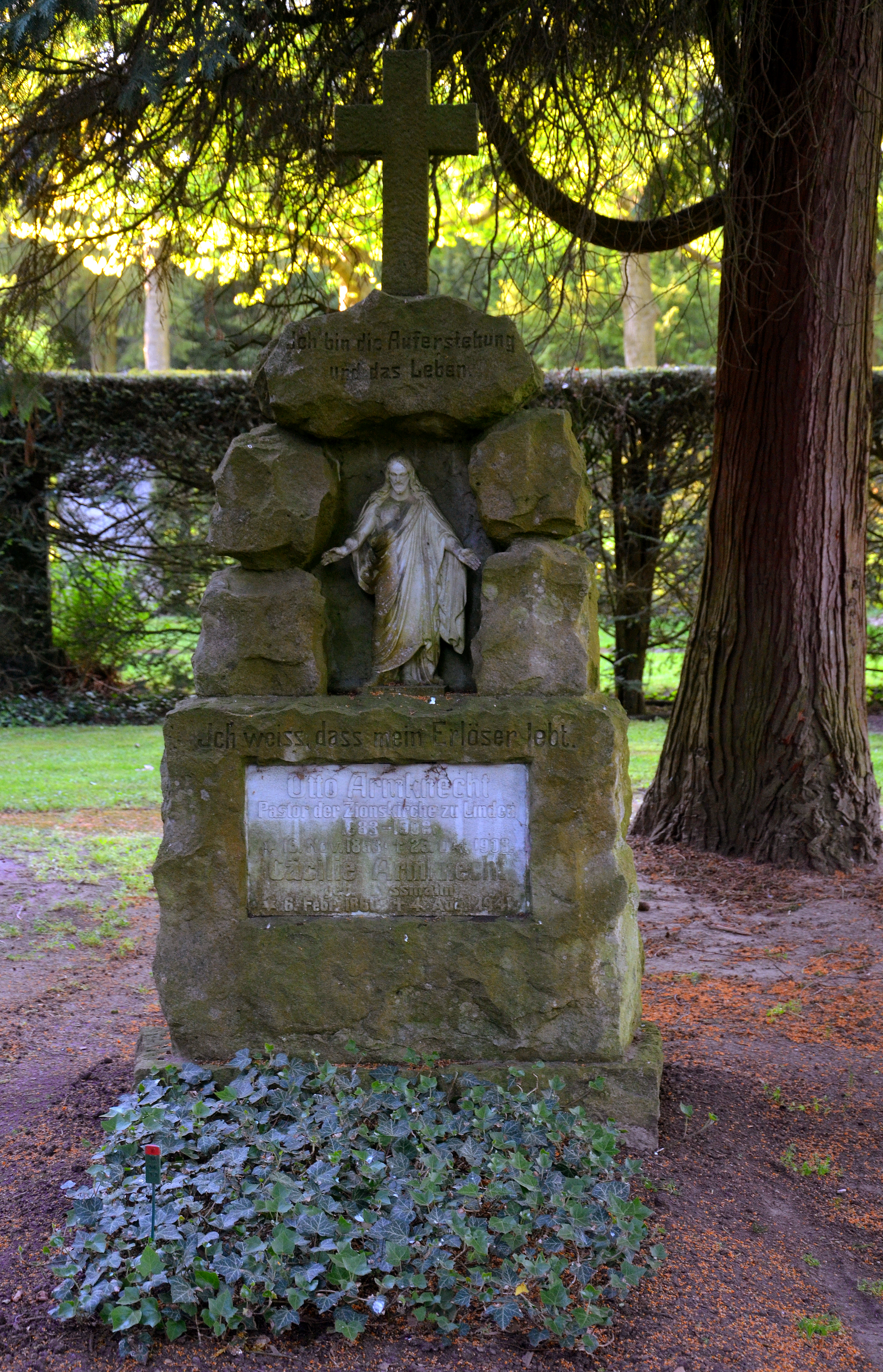 Das älteste erhaltene Grabmal auf dem Stadtfriedhof Ricklingen in Hannover ist das für die Dauer des Friedhofes eingerichtete Ehrengrab für den an der ehemaligen Zionskirche in Linden tätig gewesenen Armenpastor Otto Armknecht (* 16. November 1853; † 25. Oktober 1908) und die Cäcilie geborene Lysmann (* 6. Februar 1860; † 4. August 1941) ...